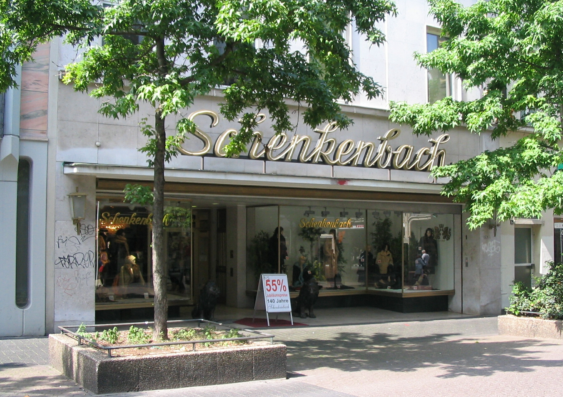 Schenkenbach, Kürschnerei in der Düsseldorfer Altstadt, Mittelstraße 1